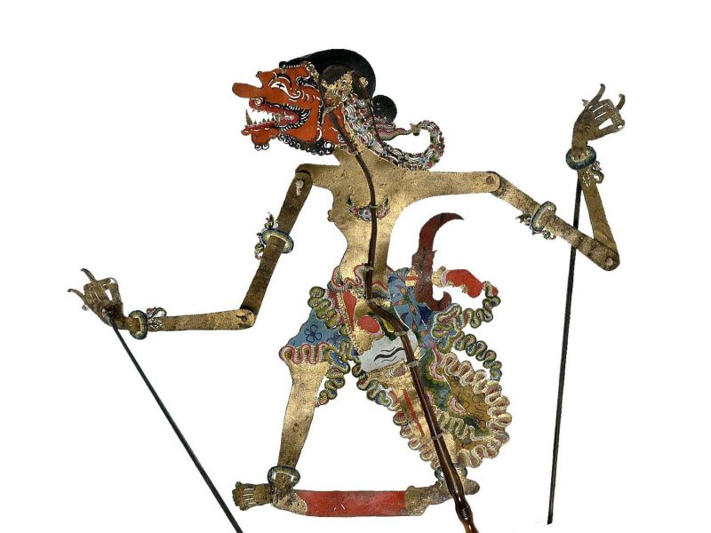 Schaduwfiguur. Wajangpop voorstellend Cakil Unknown language: Wayang kulit purwa Cakil